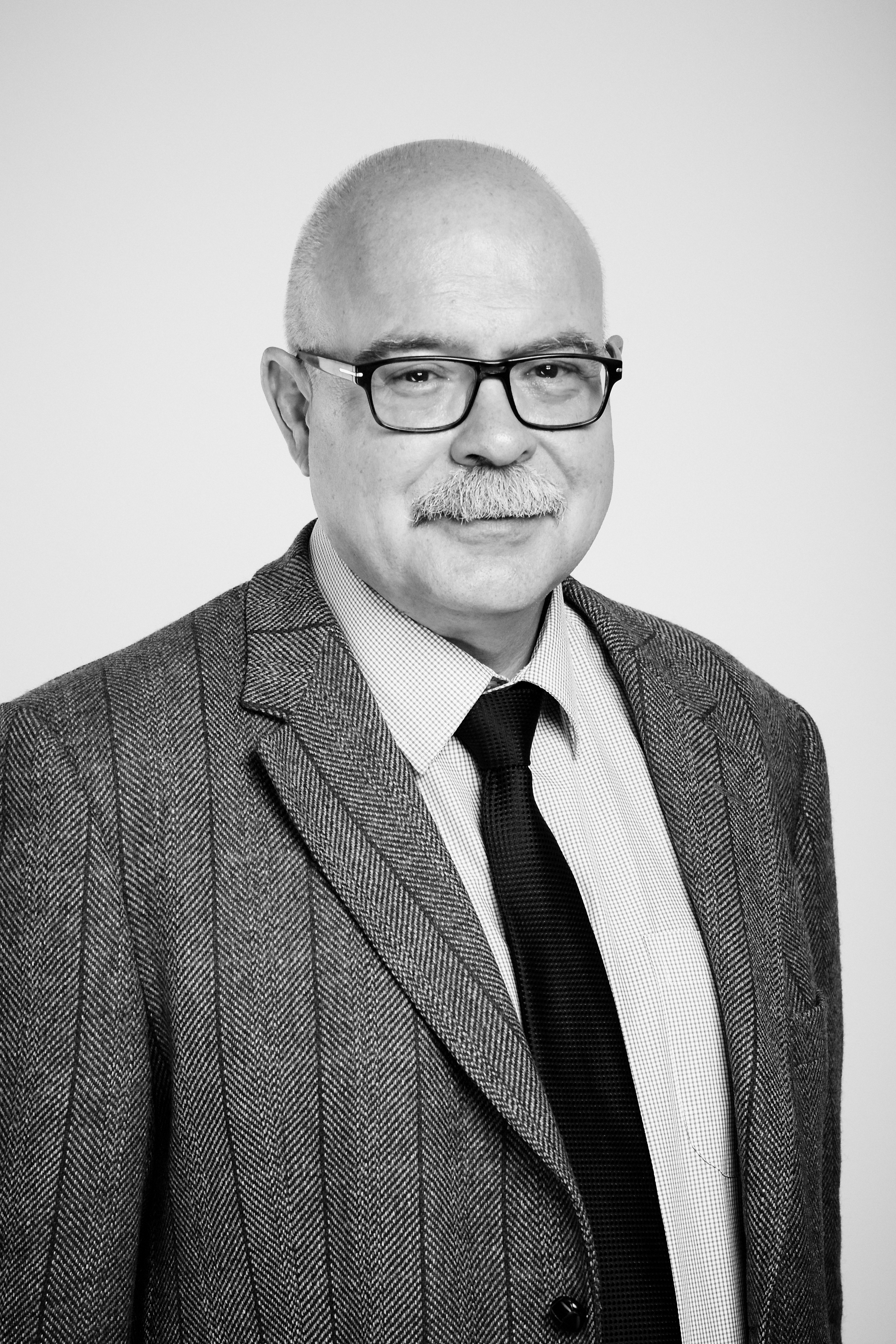 D V Trenin Version 2 bw